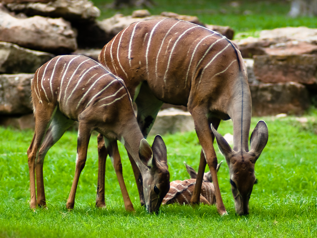 Female Lesser Kudu (Tragelaphus imberbis) in Fort Worth Zoo